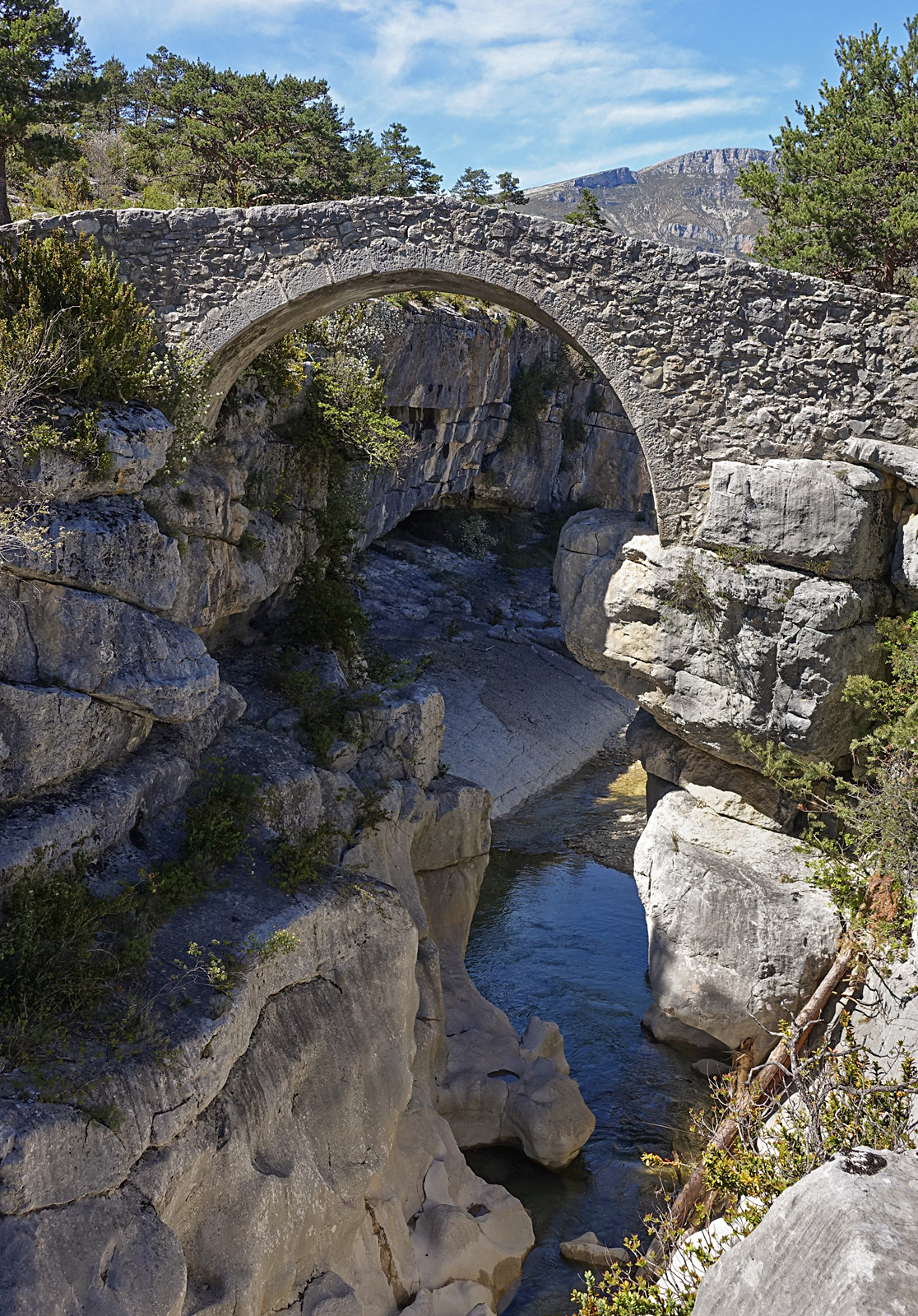 Le pont du Sautet, sur le Jabron, affluent du Verdon, à Trigance (département du Var, France)